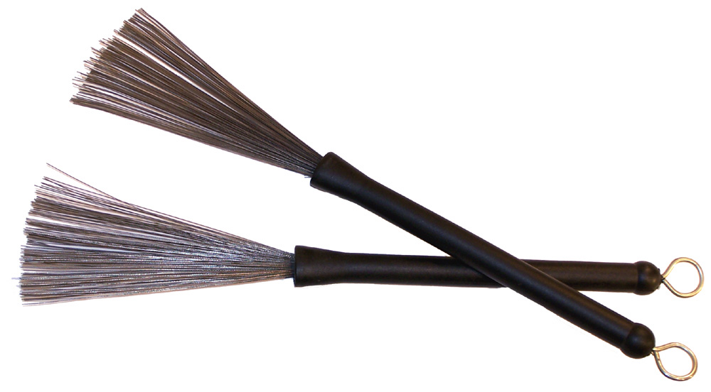 Brushes, escobillas